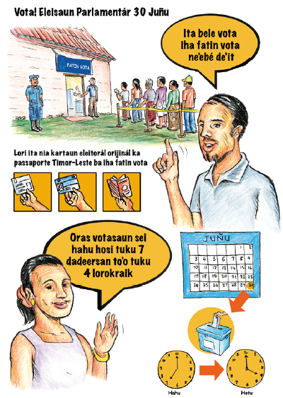 Wählerinformation zu den Parlamentswahlen 2007